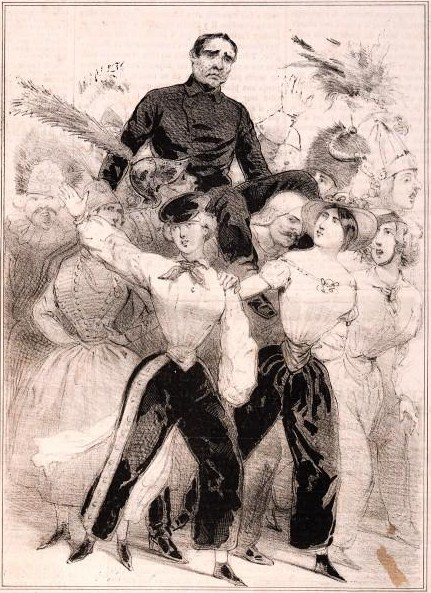 Légende de l'illustration des bals de l'Opéra : "Un triomphe aussi agréable que périlleux."